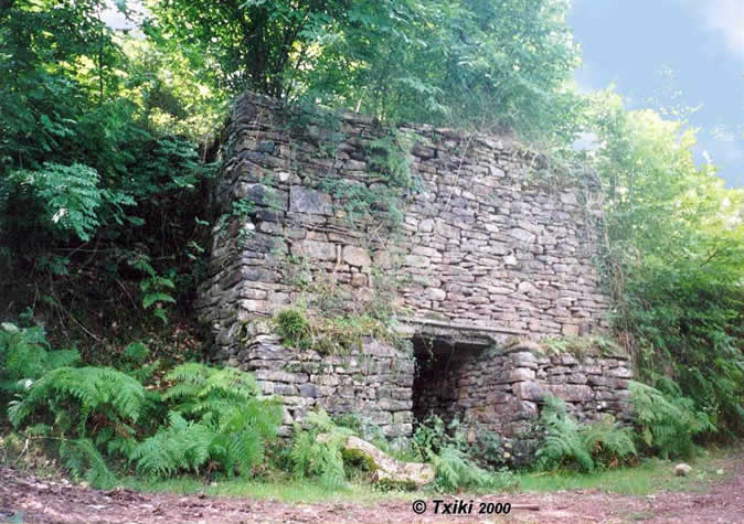 Four à chaux à Zubieta (Pyrénées).